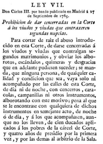 Novisima recopilación de las Leyes de España - Ley VII - 27 de septiembre de 1765